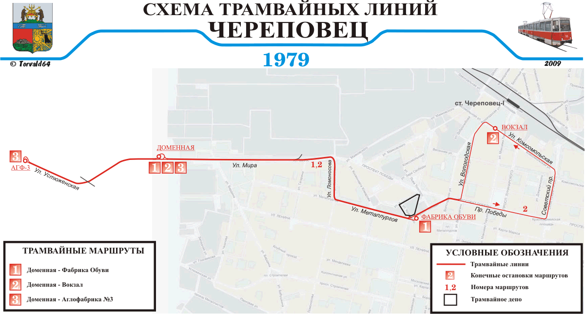 Схема трамвайных маршрутов Череповца 1979 г.